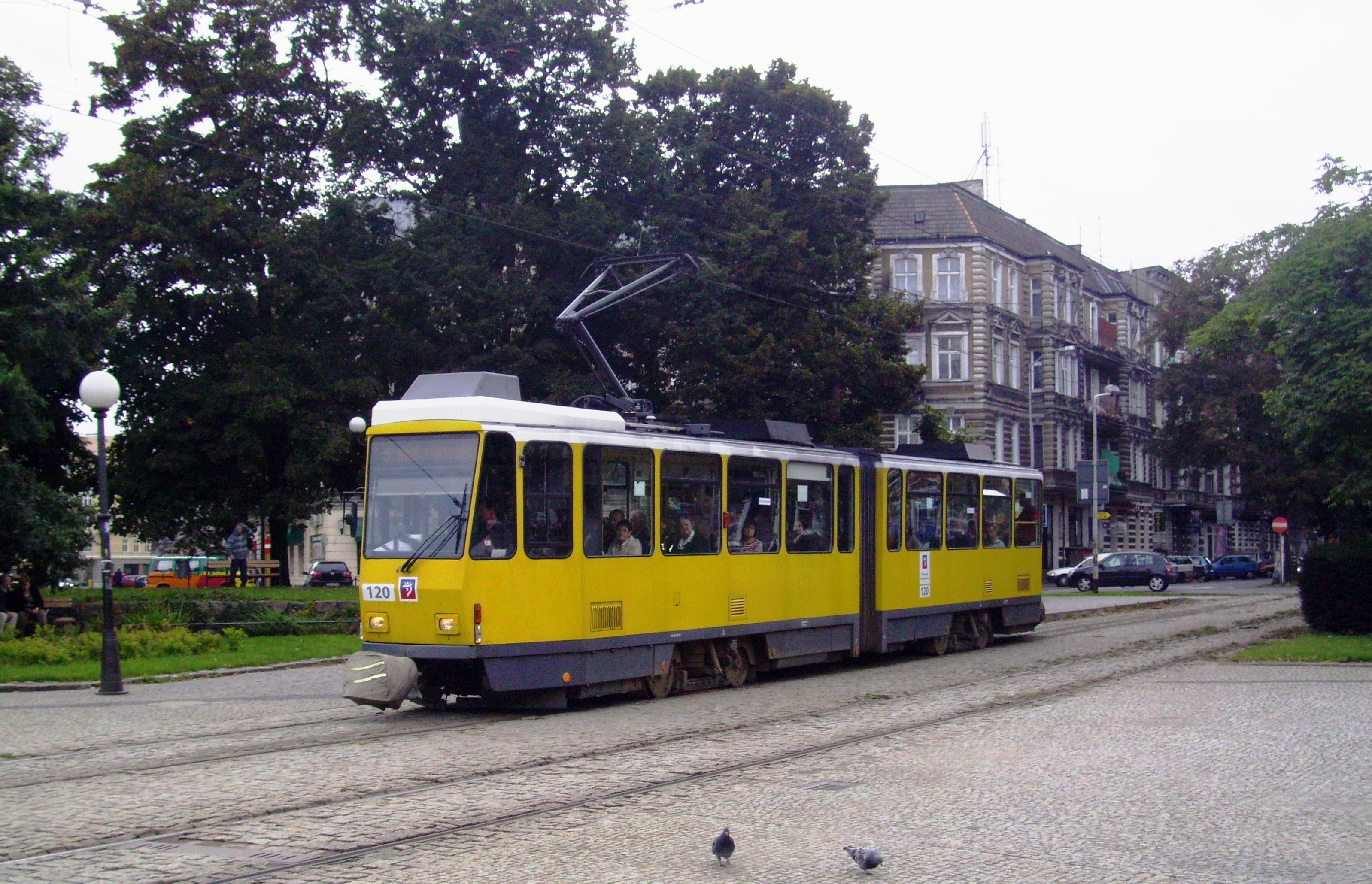 Tramwaj Tatra KT4DtM w Szczecinie.